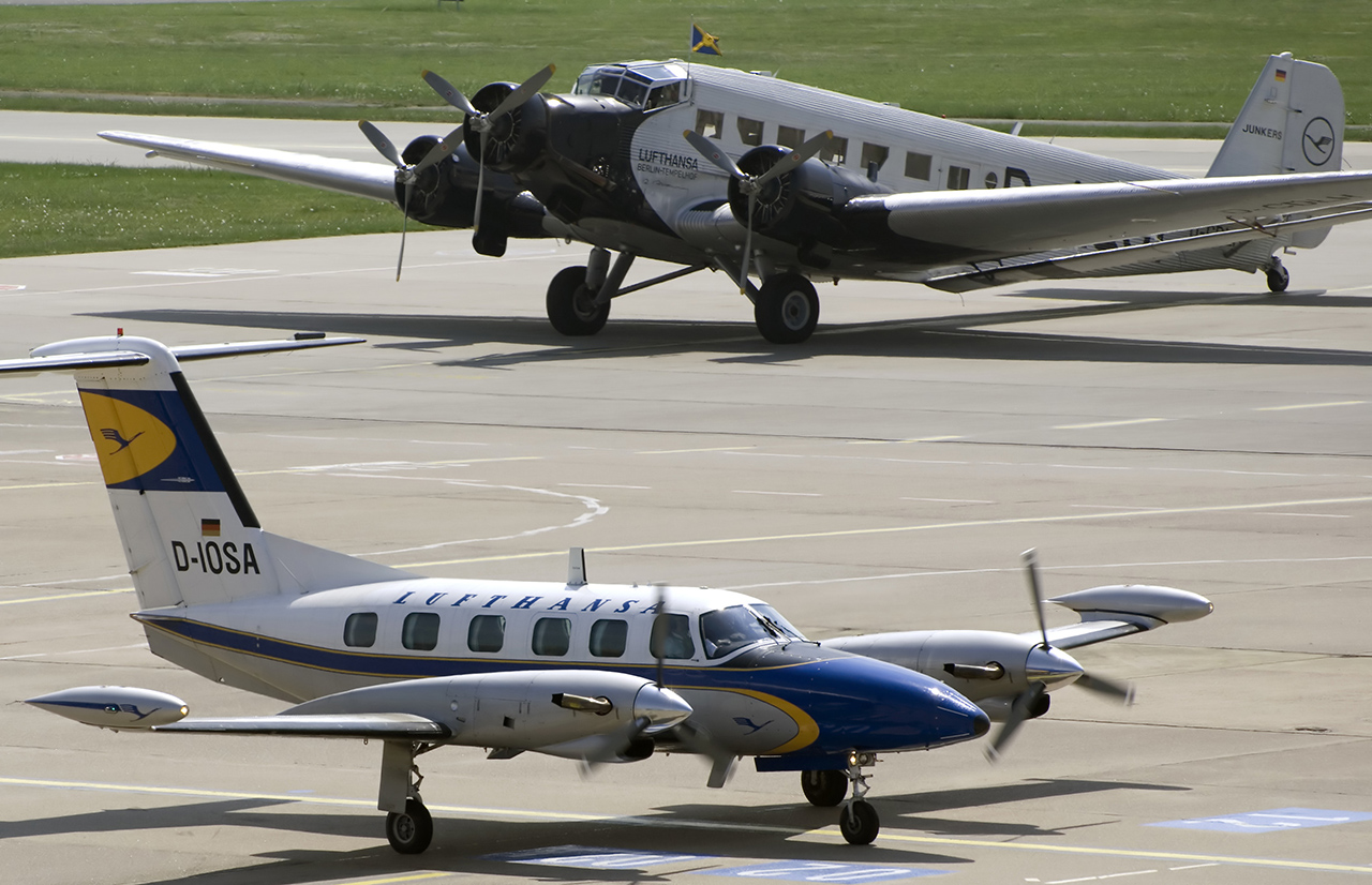 Piper and Junkers "Lufthansa"